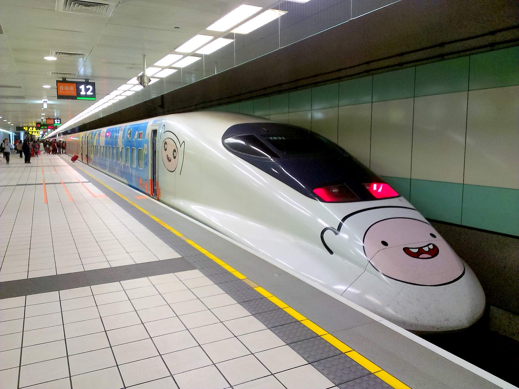 中文（台灣）: 停靠台灣高鐵桃園站南下月台的卡通頻道動畫《探險活寶》人物造型列車